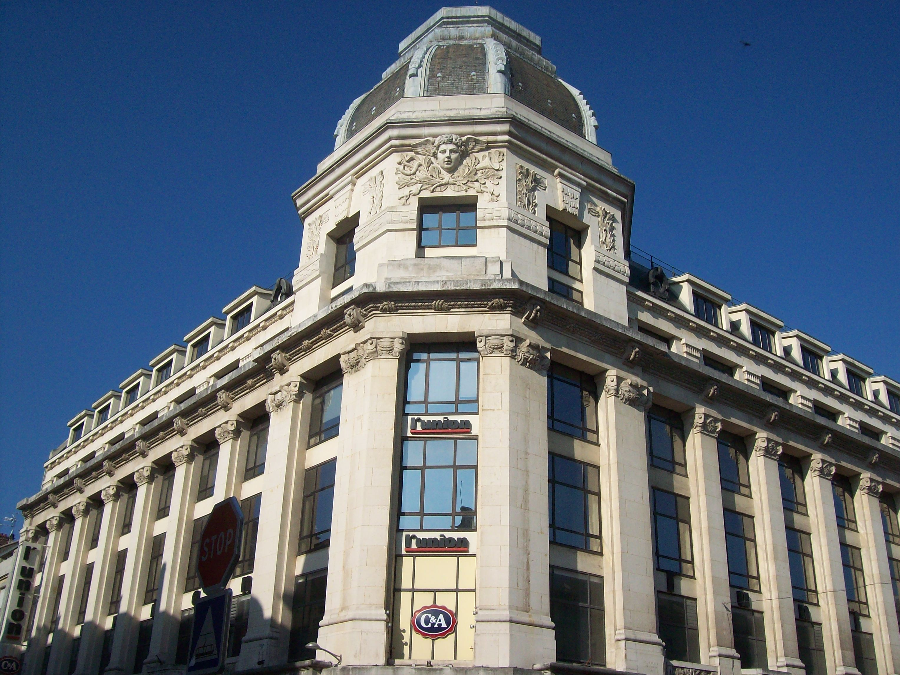 1-5, rue de Talleyrand et 18, rue de Vesle Bureaux et commerce Date de construction: 1925-1927 Architecte: Pol Gosset (1868-1942) Edifié par les Docks Rémois pour abriter des expositions permanentes consacrées aux industries rémoises. Massif dôme octogonal orné d'une tête de Mercure.